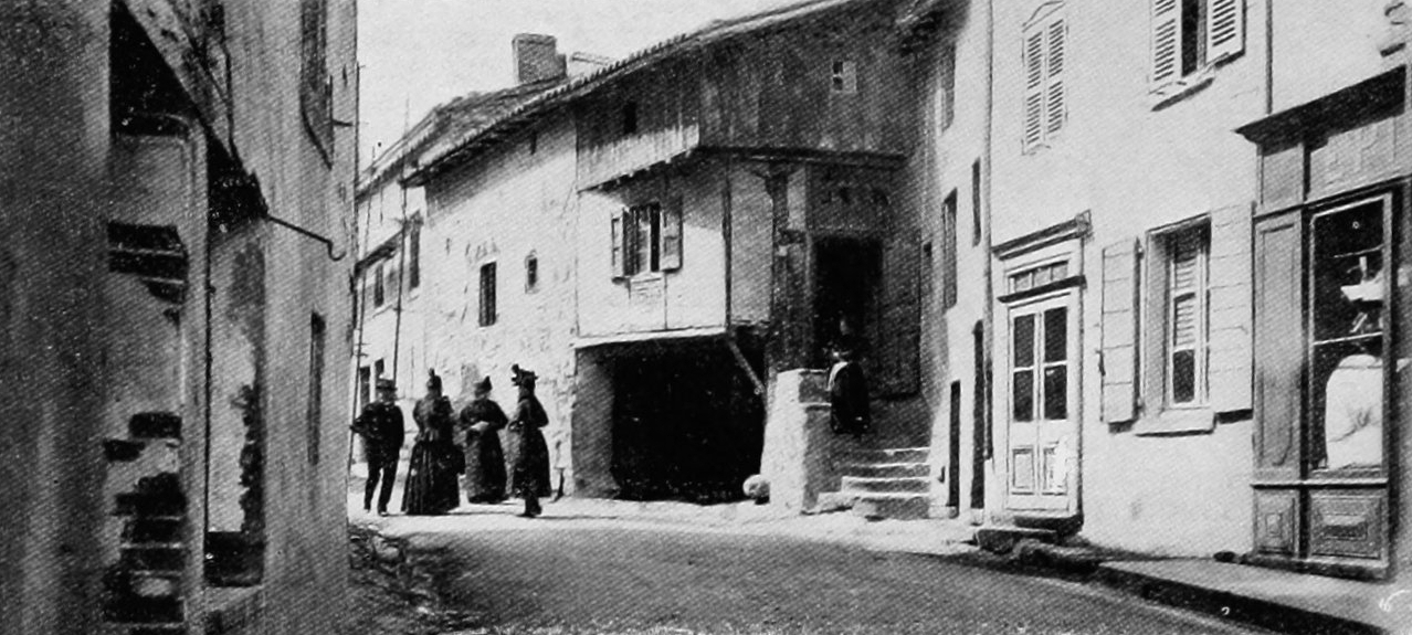 Dictionnaire illustré des communes du département du Rhône. Tome 2 / par MM. E. de Rolland et D. Clouzet.